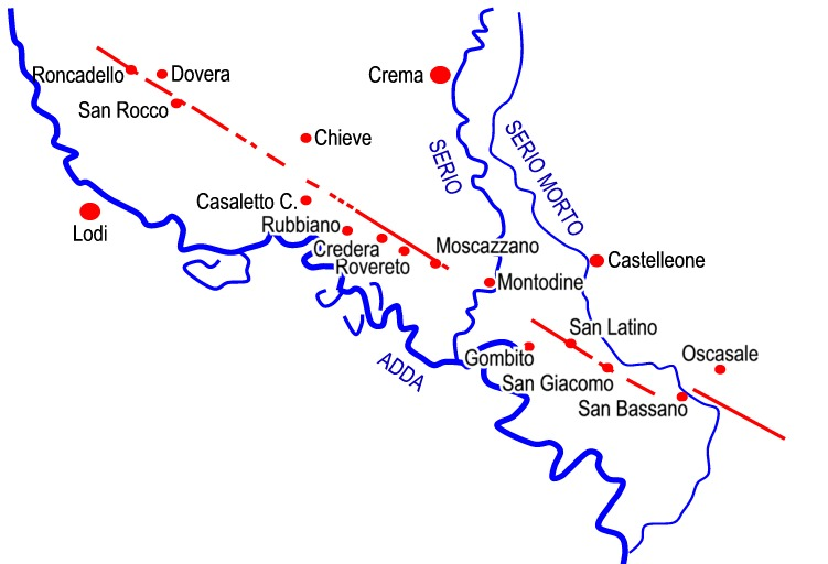 Cartografica delle tracce della via Regina nel tratto compreso tra Roncadello e San Bassano